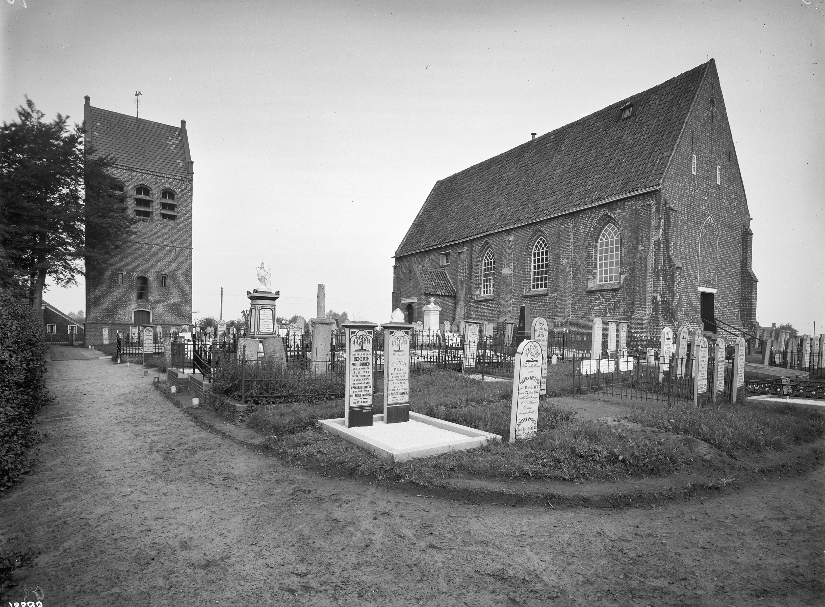 Nederlands Hervormde Kerk: exterieur vanuit het zuid-oosten